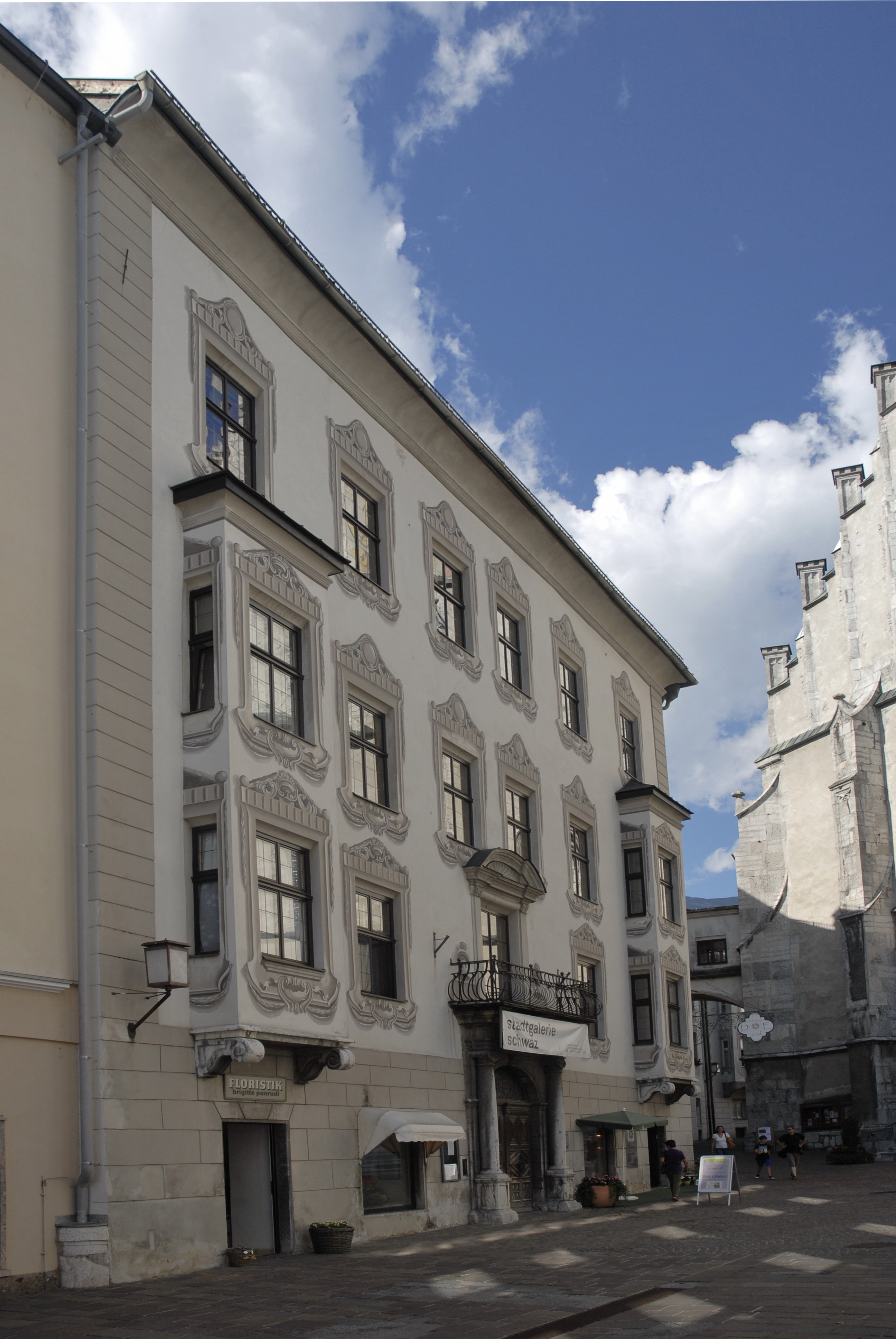 Schwaz, Palais Enzenberg, Franz-Josef-Straße 27